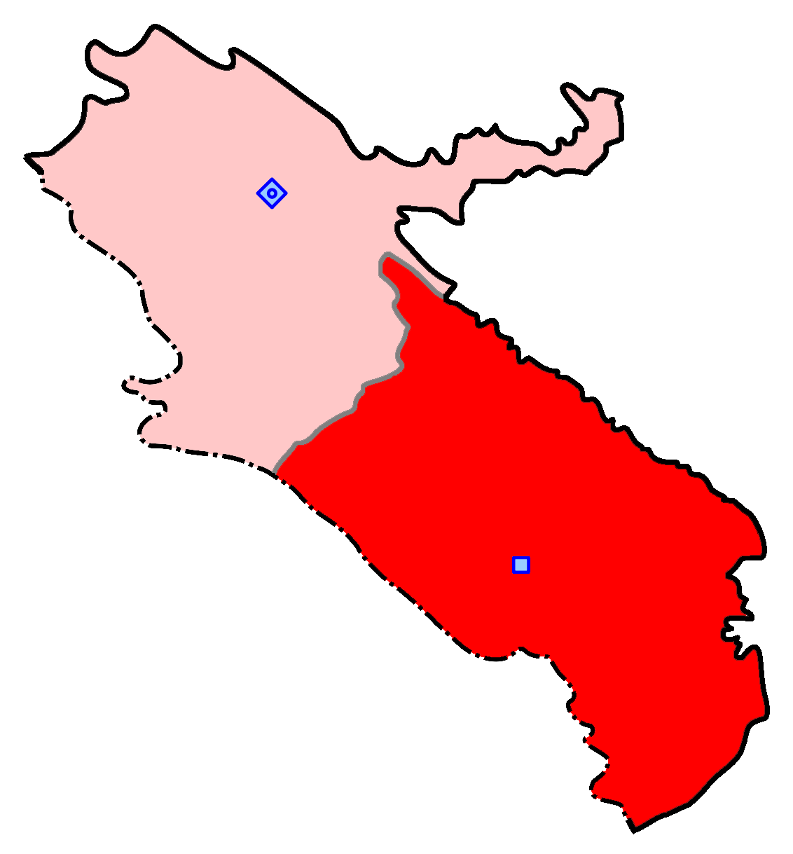 حوزهٔ انتخاباتی دهلران و دره‌شهر و آبدانان برای انتخابات مجلس شورای اسلامی